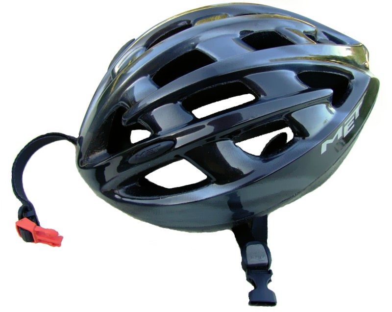 Bicycle Helmet (Cykelhjelm)